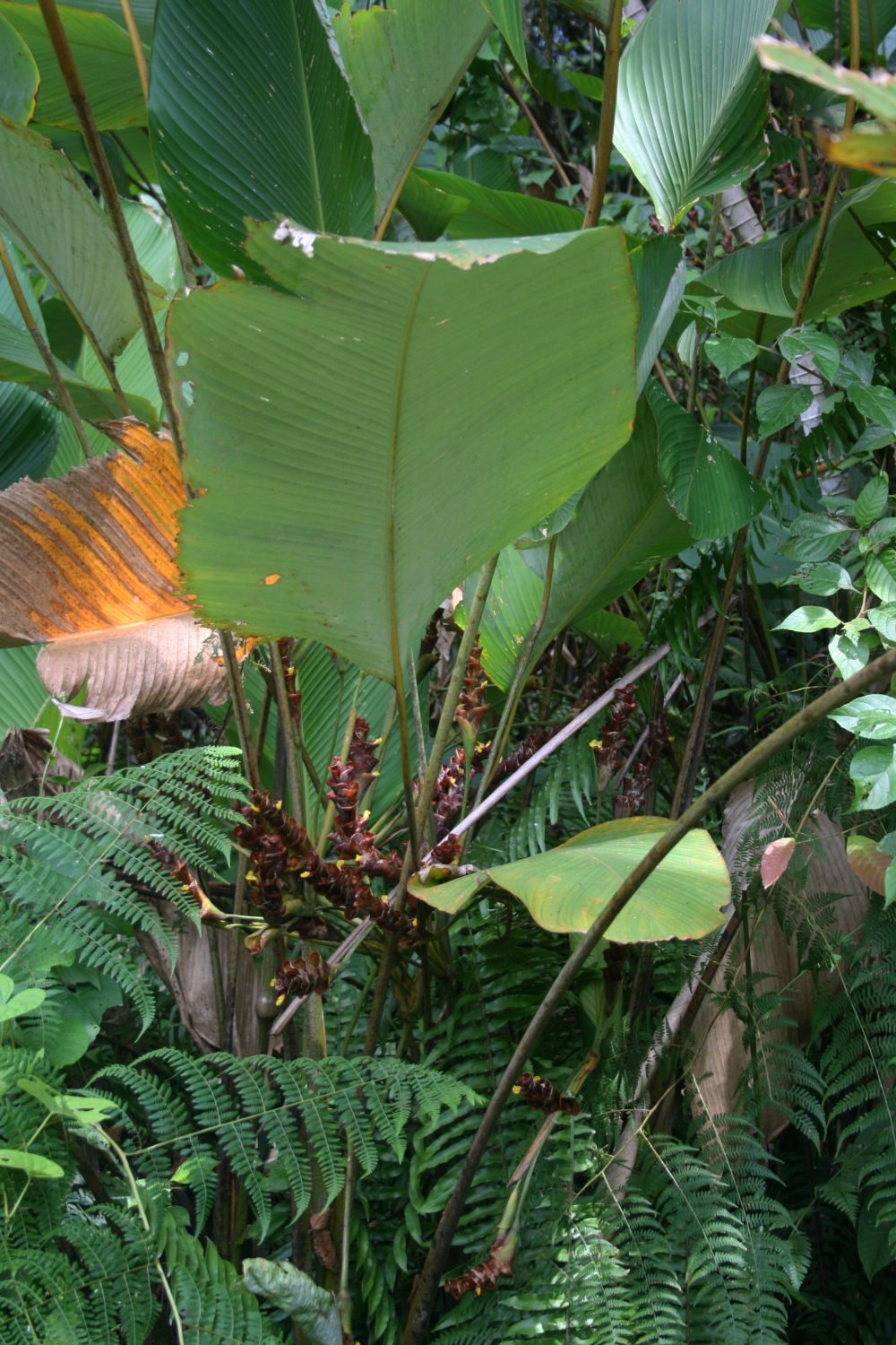 Calathea lutea, Pfeilwurzgewächse (Marantaceae) - Costa Rica: Prov. Puntarenas, La Gamba NW Golfito, "Laguna" zwischen "Tropenstation La Gamba"/"Estación Biológica La Gamba" und "Esquinas Rainforest Lodge"